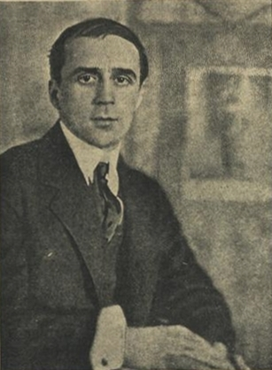 Русский балетмейстер Михаил Фокин, обративший на себя за границей исключительное внимание.